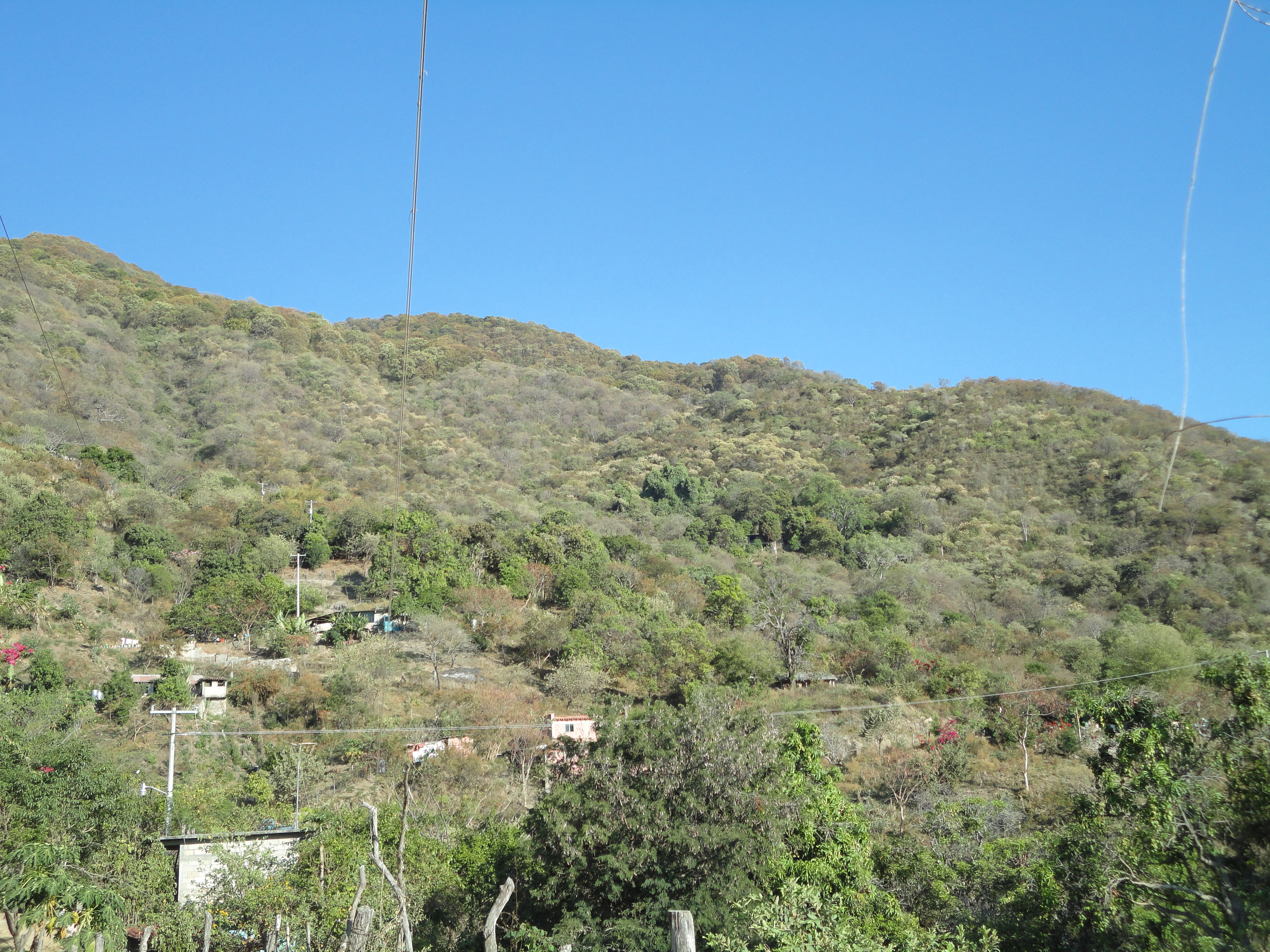 Esta es la imagen perfecta para describir el por que se le dio ese nombre a esta cpmunidad.